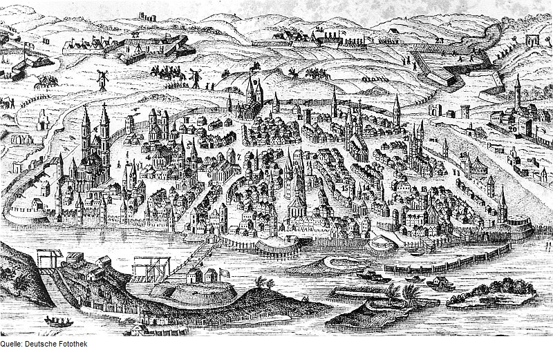 Original image description from the Deutsche Fotothek Magdeburg. Stadtansicht, 1551, aus: Hoffmann, Friedr. Wilh.: Geschichte der Stadt Magdeburg, 1856